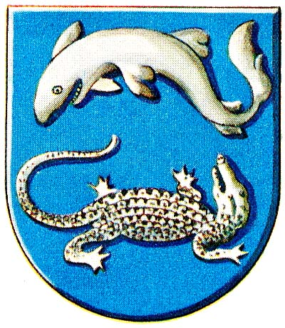 Afbeelding afkomstig uit: Gonggryp geïllustreerde encyclopedie voor Nederlandsch-Indië uit 1934.